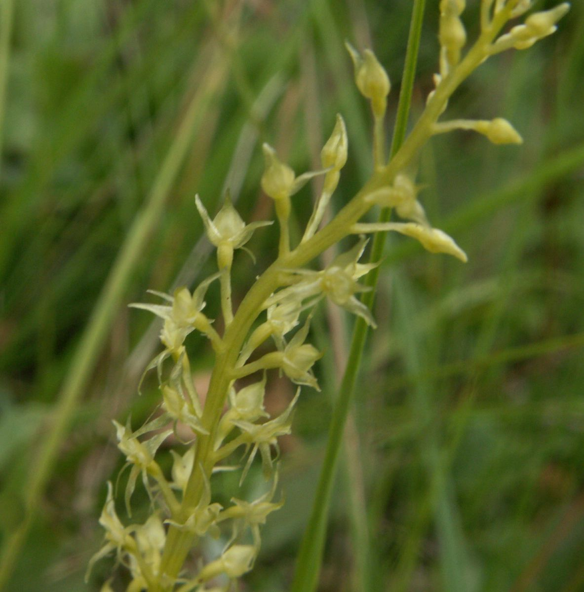 Malaxis monophyllos Niedermoor, Litauen